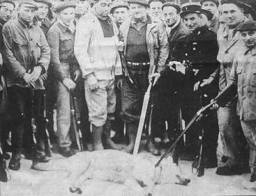 Loup abbatu à Vasselin, photo de journal (avant 1932/33).